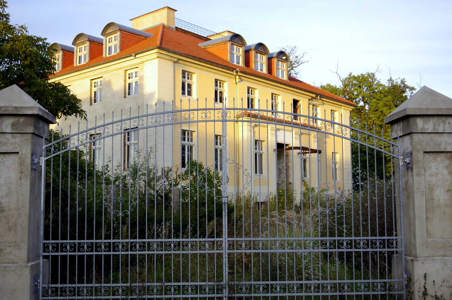 Pałac w Pakosławsku, pow. milicki - widok od frontu